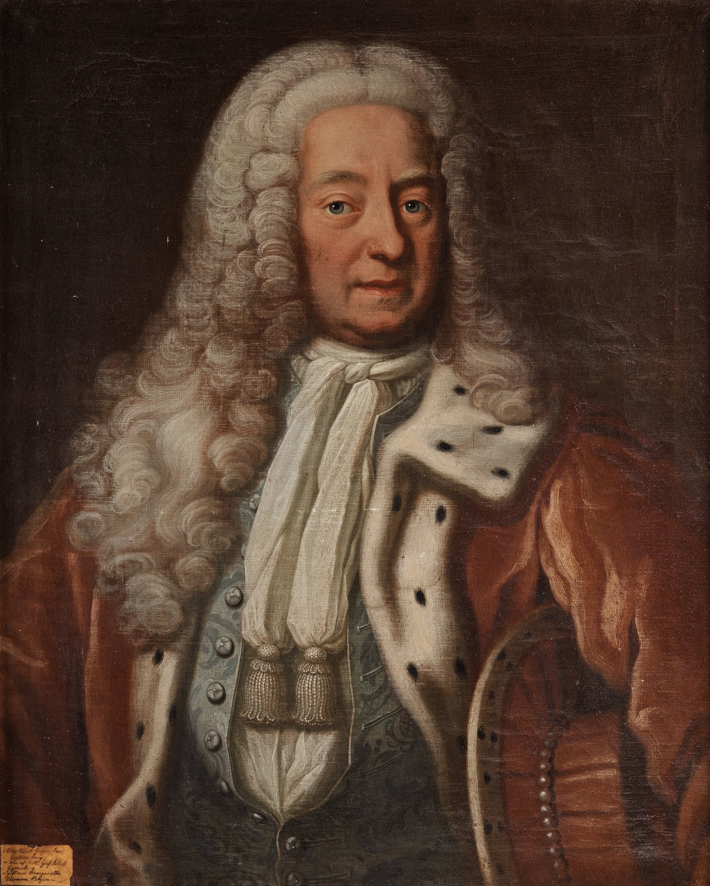 Johan Gyllenborg (1682- 1752), okänd svensk konstnär. Påskrift på baksidan: "Johan Gyllenborg Comes, Regis Regnigue SueciaSenator, et Academia Carolina Cancellarius, Natus Anno MDCLXXXII, Delinealus MDCCXLVII". Troligen utförd 1747.